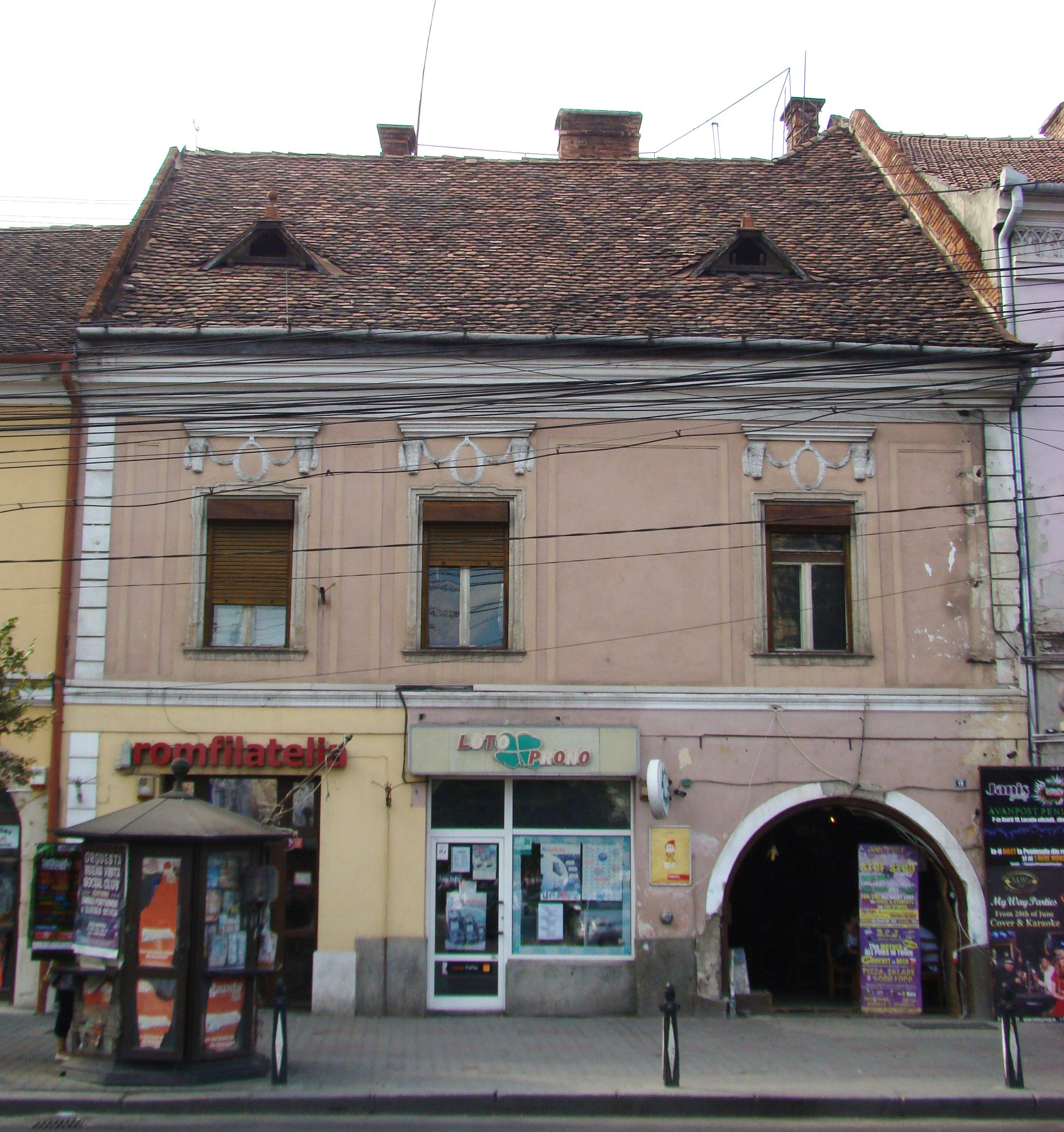 Casă monument istoric, Piața Unirii 19